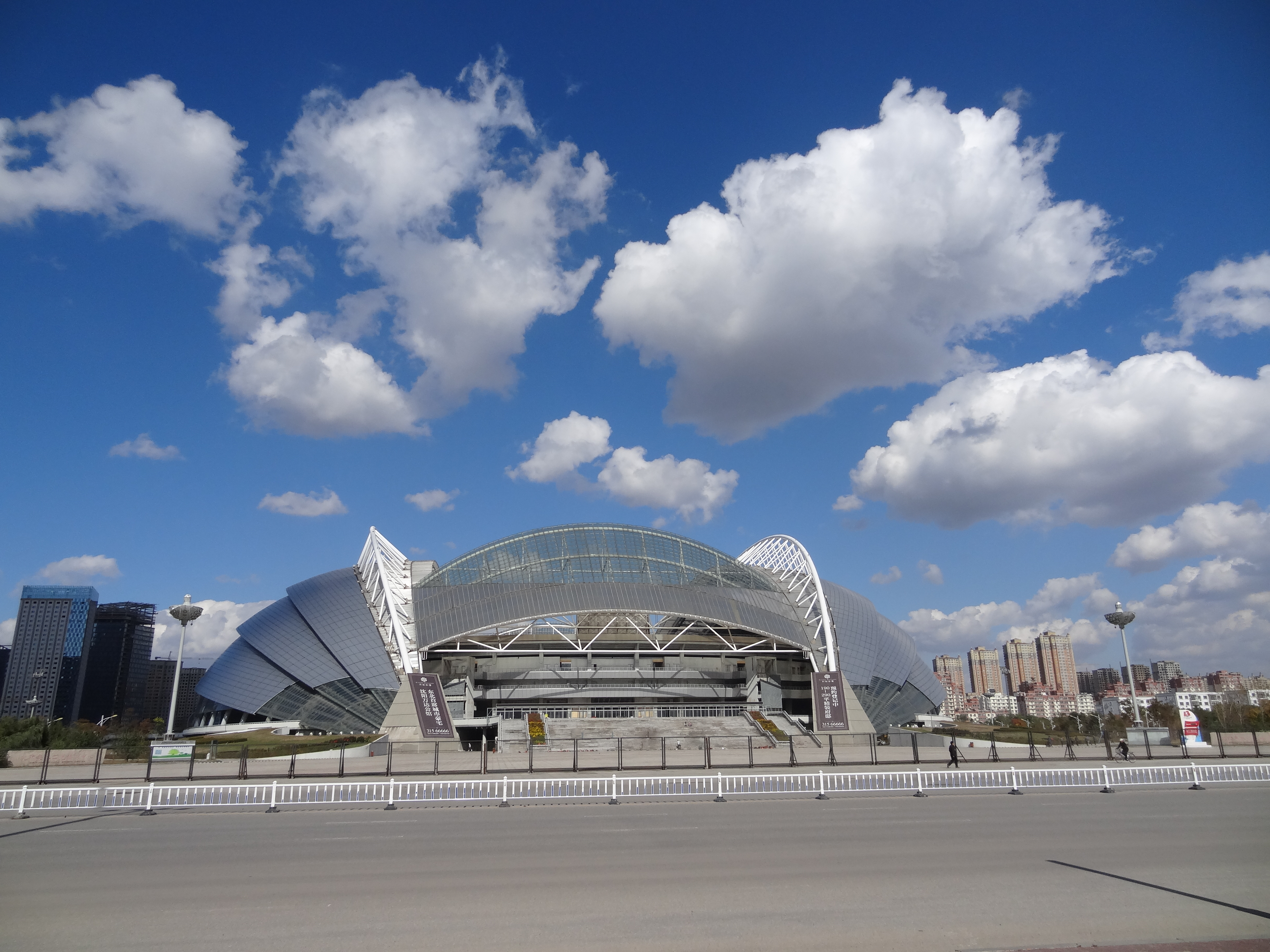 中文（中国大陆）: 沈阳奥体中心